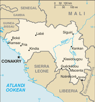 Guinea kaart